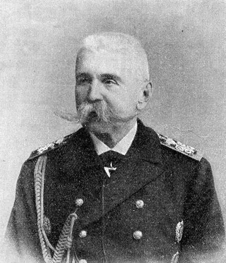 Николай Иванович Казнаков, русский адмирал, генерал-адъютант.